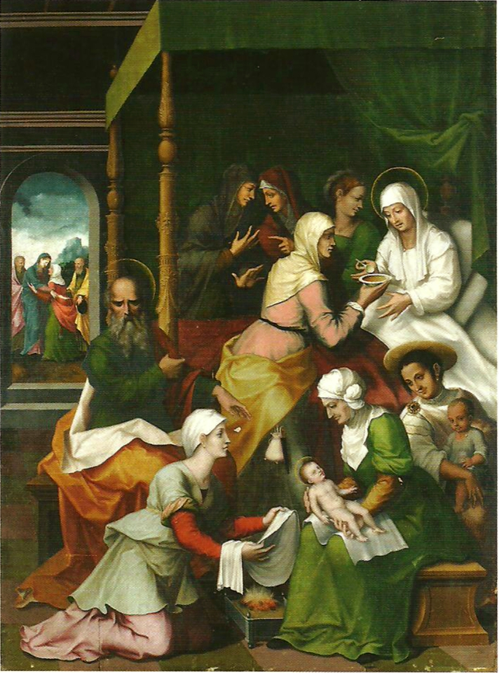 La obra representa el nacimiento del profeta San Juan Bautista, precursor del Mesías.